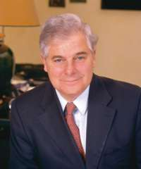 PASCAL CLEMENT